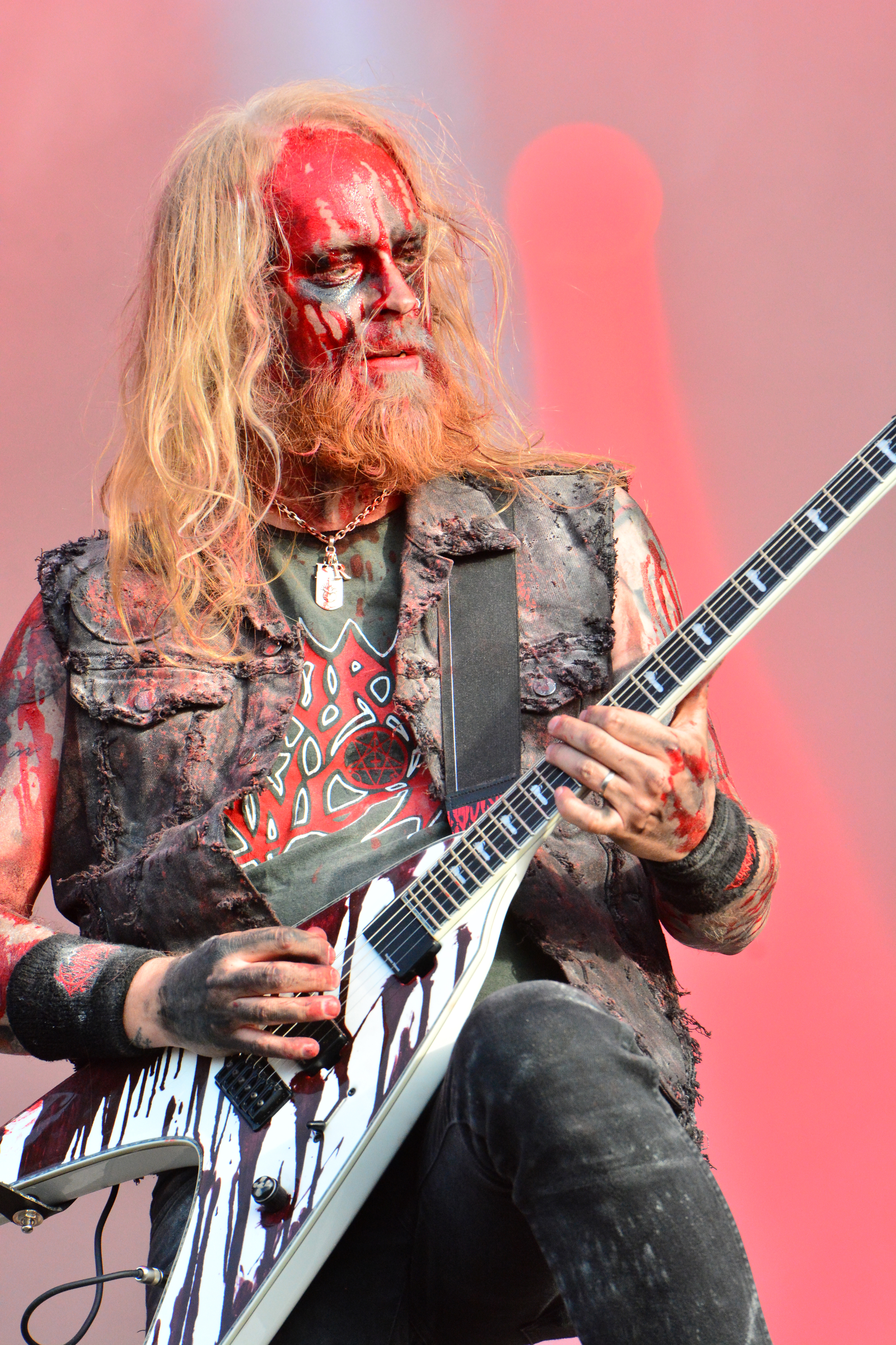 Bloodbath beim Wacken Open Air 2015